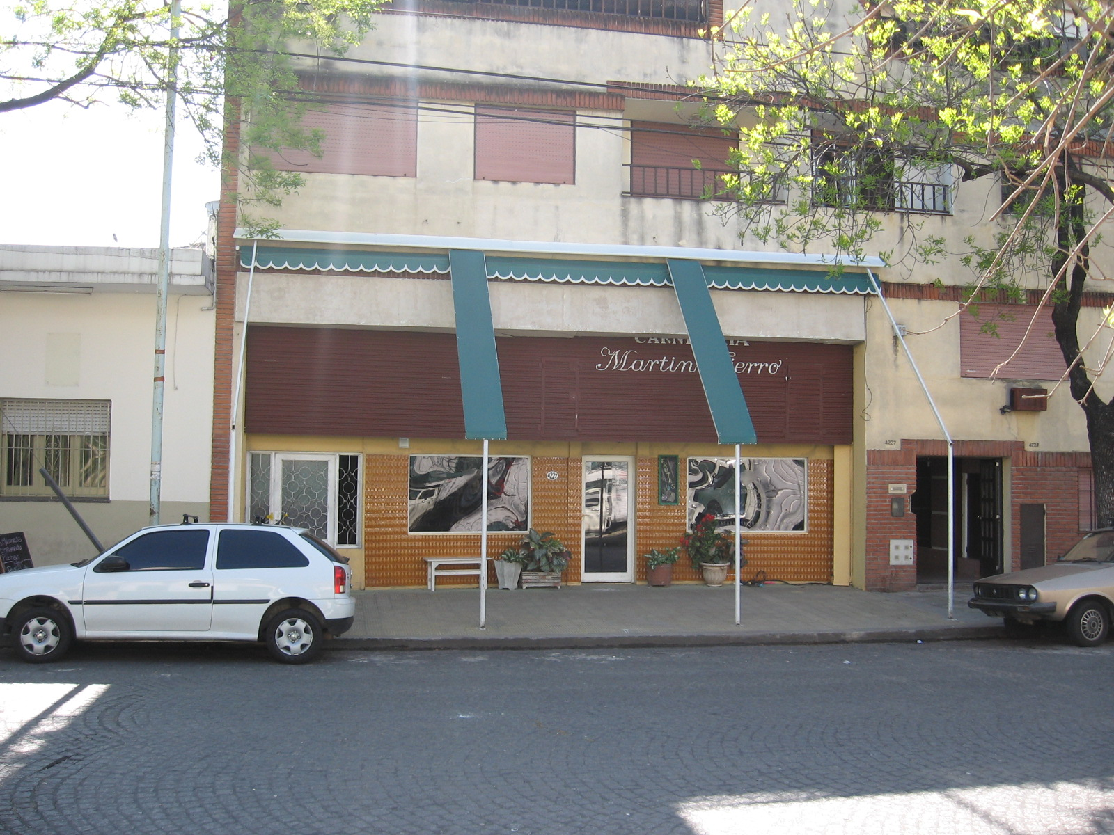 Set de filmación utilizado para las escenas de la telecomedia "Son de Fierro", situado en Terrada 4200 en la ciudad de Buenos Aires. Representa en la ficción la carnicería de la familia protagonista de la tira.